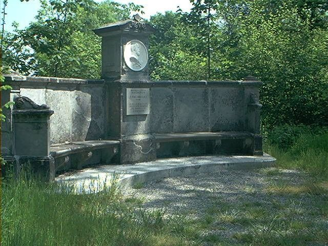 Sitzbank zu Ehren Kaiser Wilhelms I., Fürstlicher Park der Fürsten von Hohenzollern-Sigmaringen, Park im Stil der Englischer Landschaftsparks, 72505 Krauchenwies